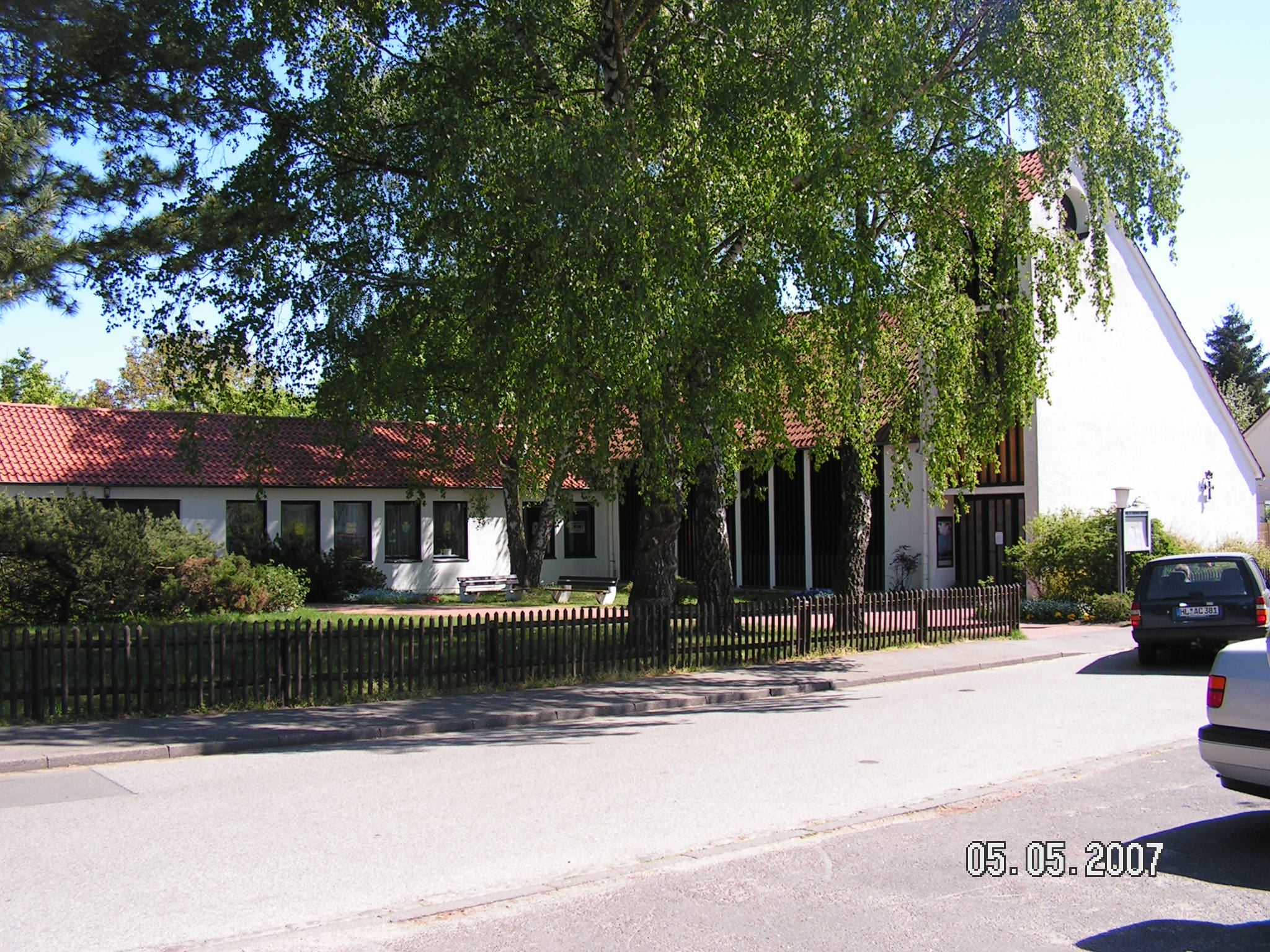 Karlshof/St.Stephanus mit Gemeindehaus